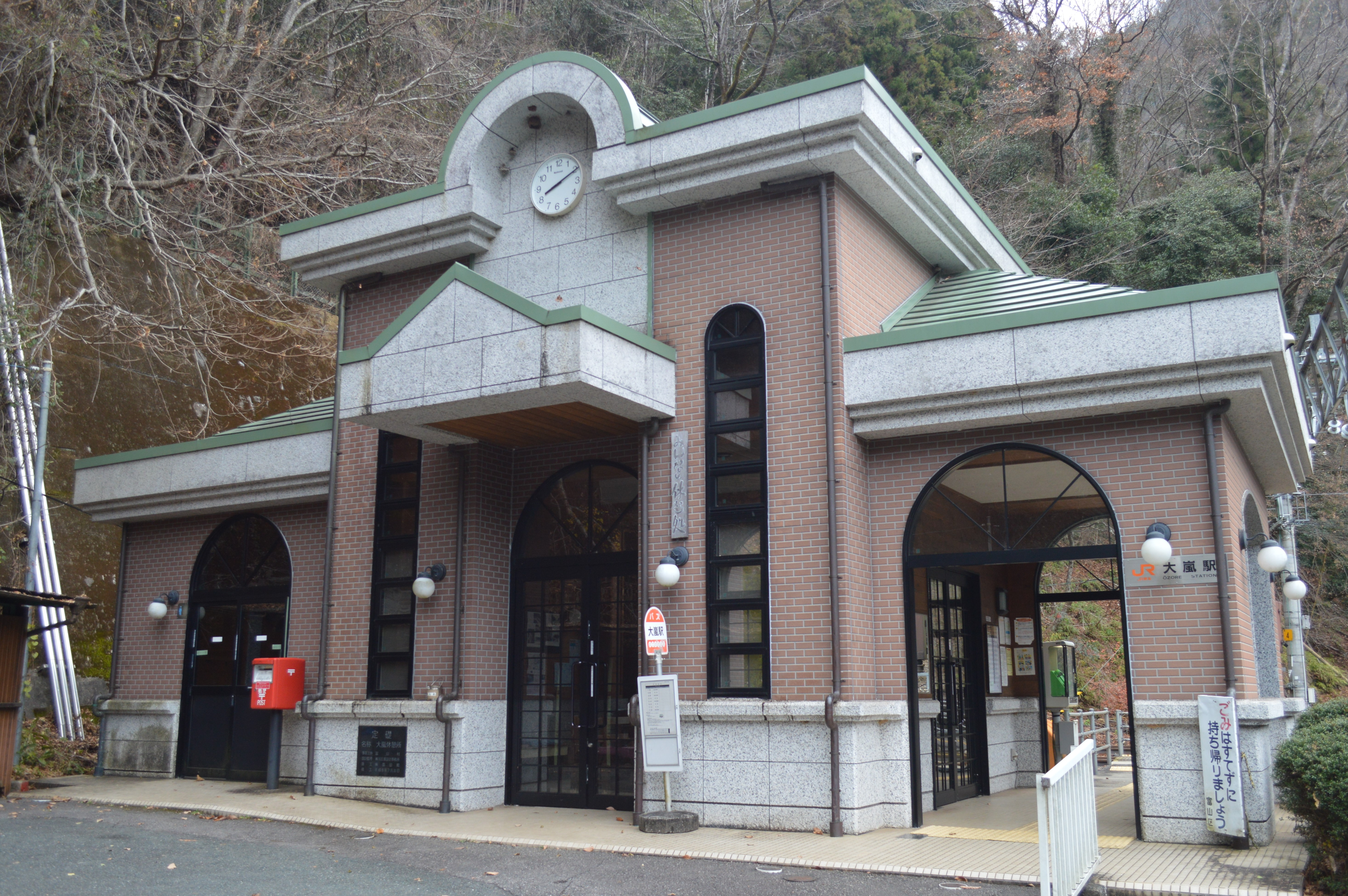 JR飯田線大嵐駅。静岡県浜松市天竜区。